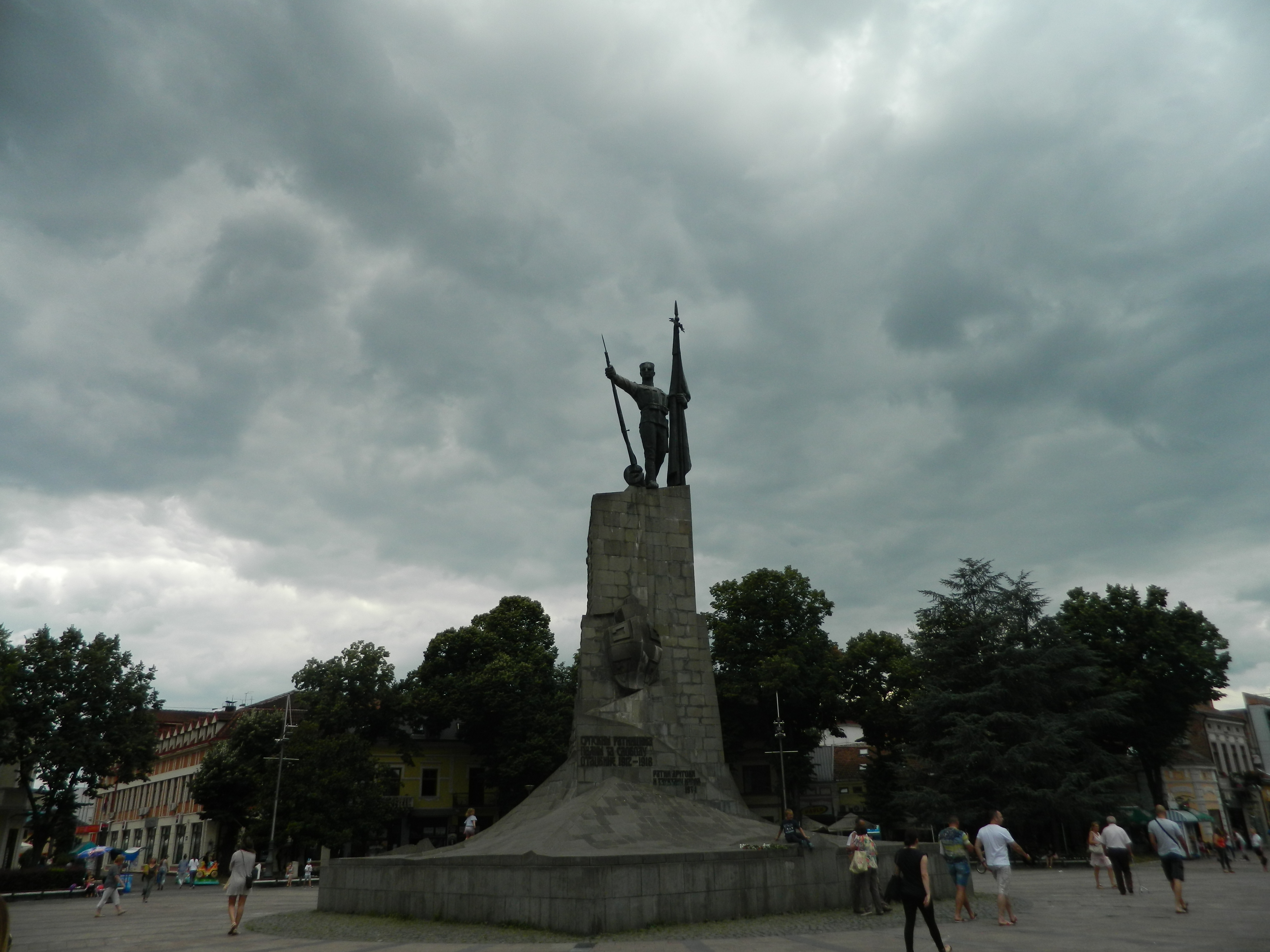 Further information: Spomenik srpskom vojniku u Kraljevu